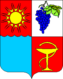 Герб Пионерского